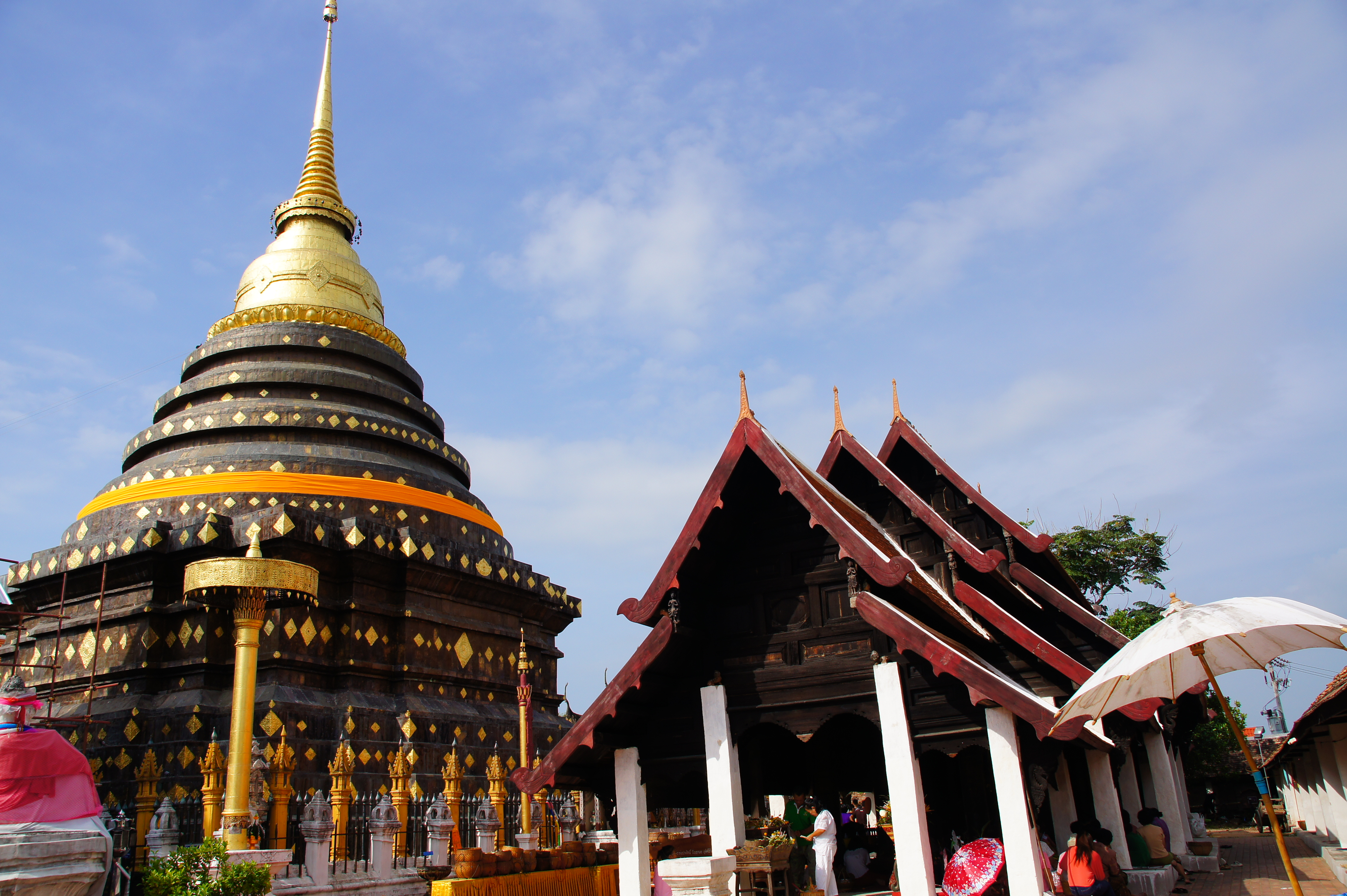 วัดพระธาตุลำปางหลวง